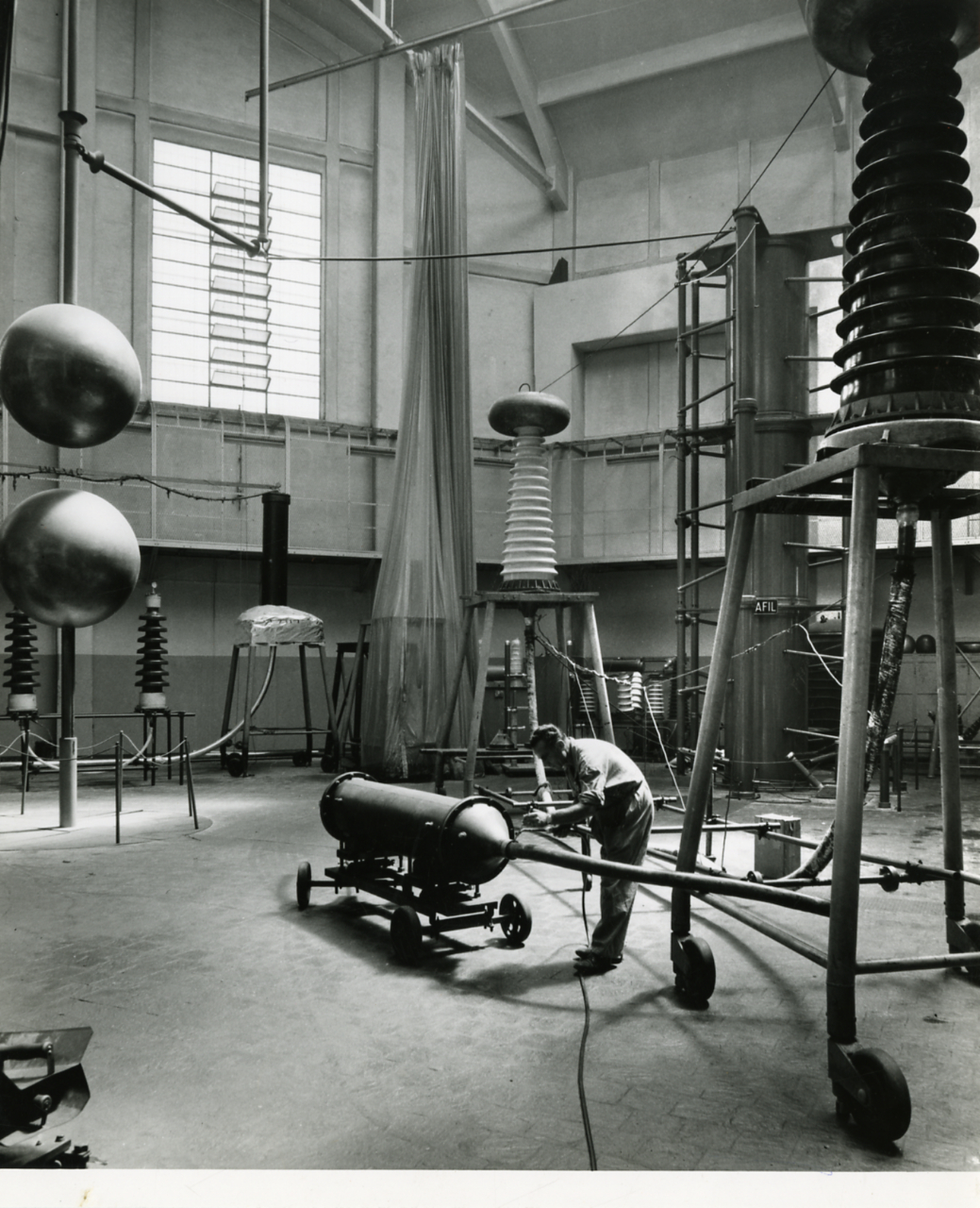 Milano. Pirelli? Stabilimento. Esterni e interni. Prove cavi elettrici. Impianti di trasformazione. Servizio fotografico : Milano, 1965 / Paolo Monti. - Stampe: 4 : Positivo b/n, gelatina bromuro d'argento/ carta, 24x30. - ((Confronta scheda G19134-19146. - Sul coperchio della scatola iscrizione didascalica manoscritta a pennarello nero: "Scultura".